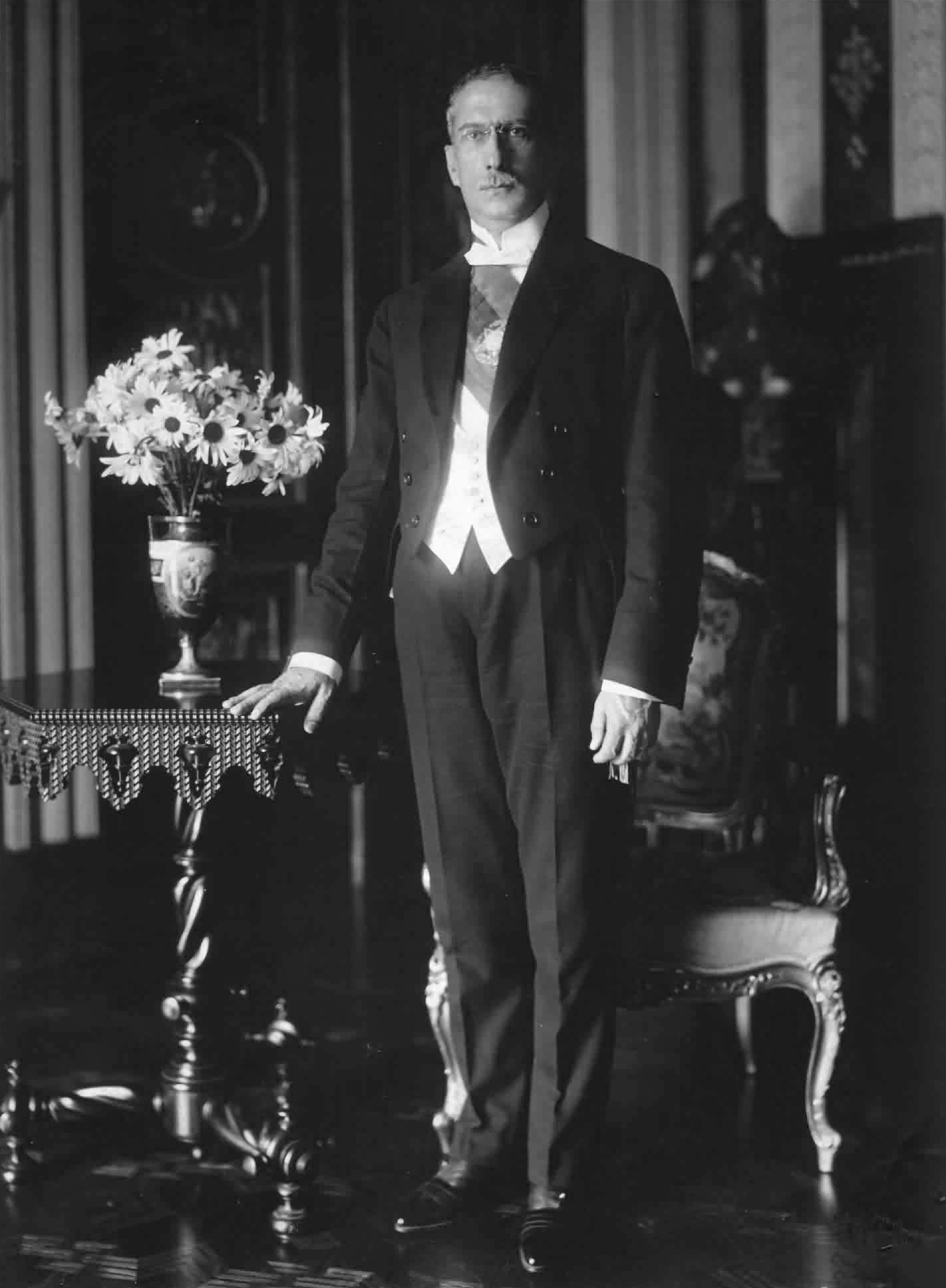 PRESIDENTE ARTHUR DA SILVA BERNARDES COM A FAIXA PRESIDENCIAL.